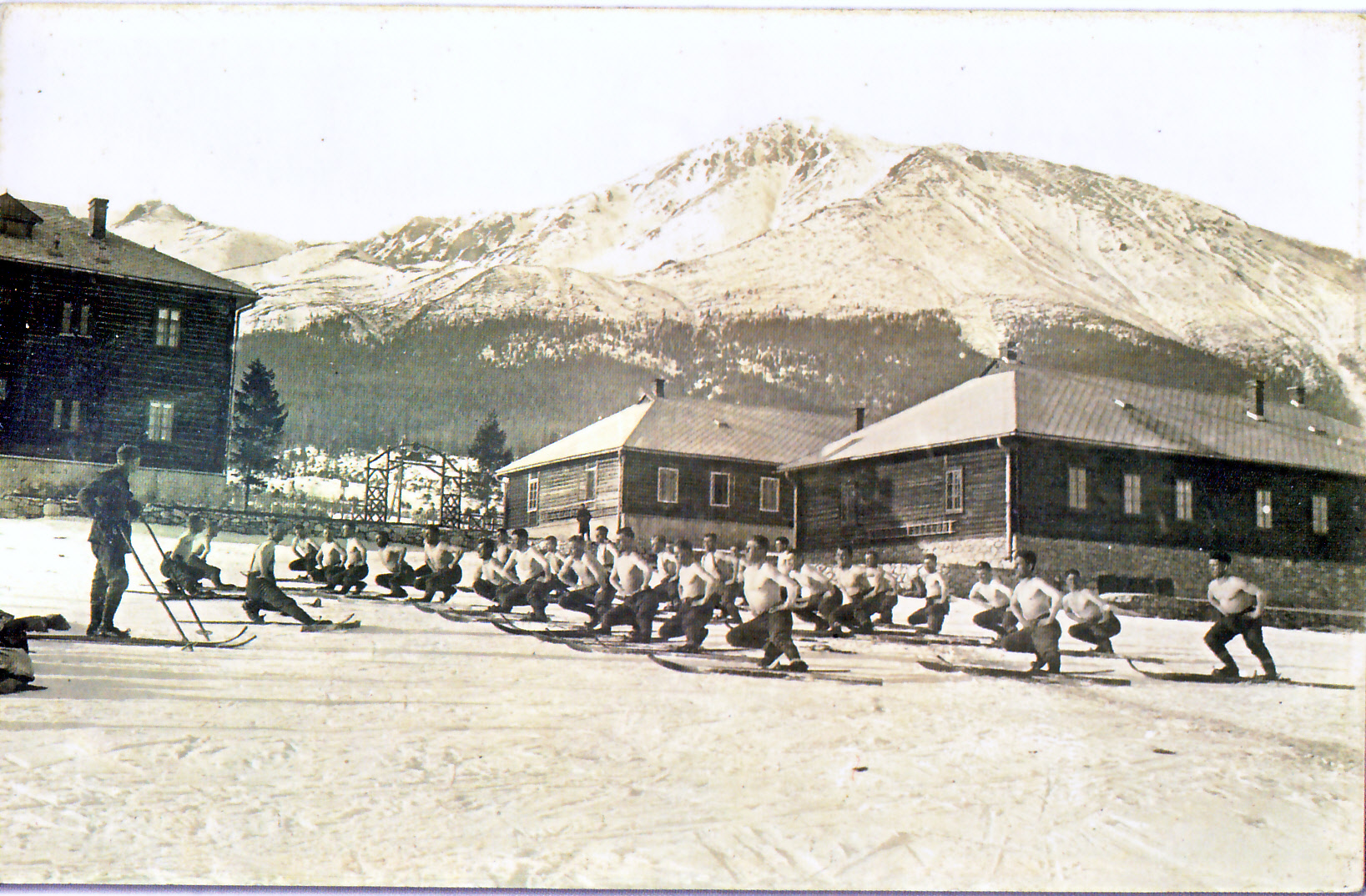 2. horská pešia brigáda v Spišskej Novej Vsi zriadila po prvej svetovej vojne technickú rotu v Poprade. Generál Votruba a major Dusil presadili výstavbu výcvikového strediska, ktoré postavili na mieste dnešných Tatranských Zrubov a dali do prevádzky v roku 1925.